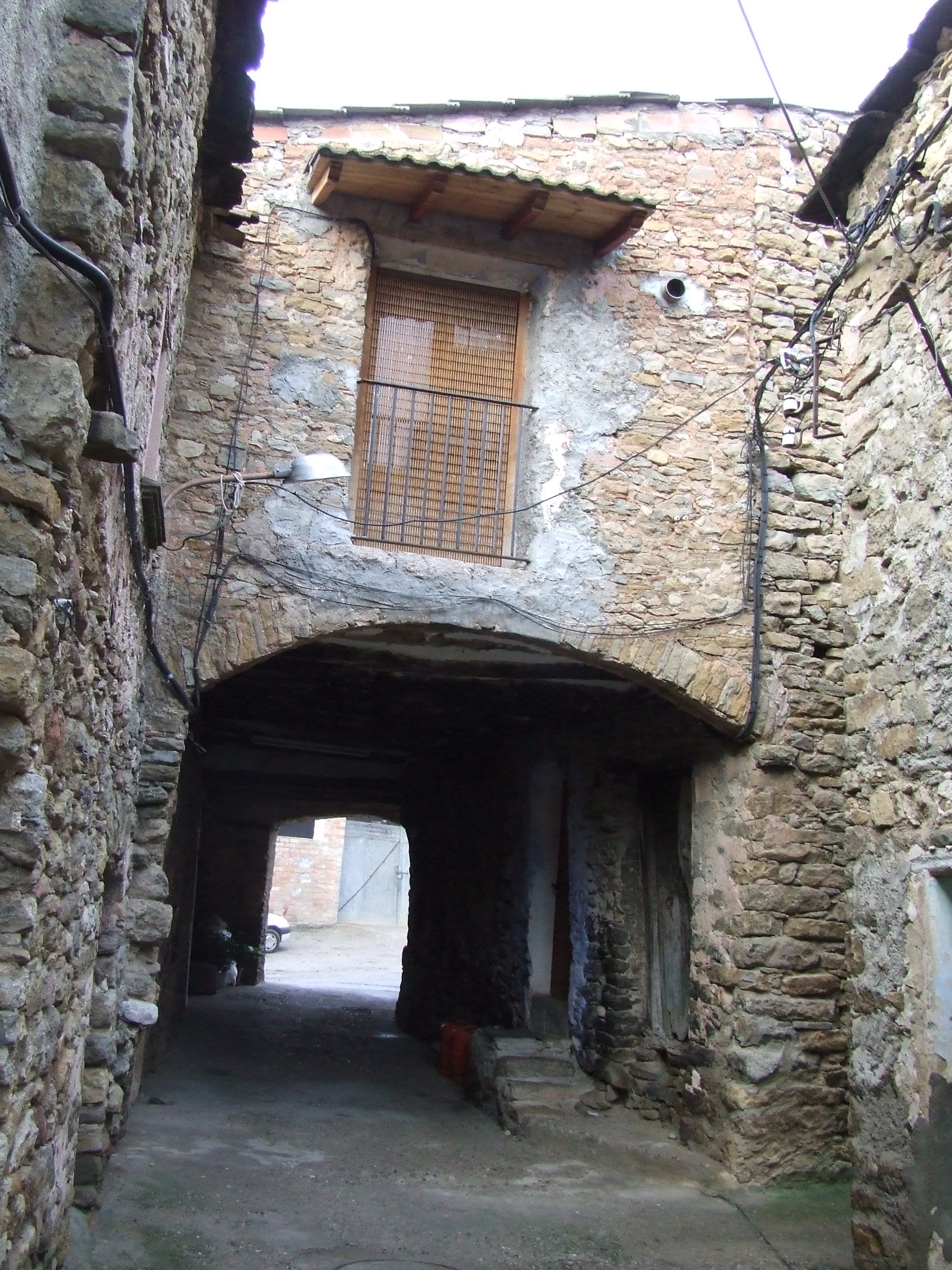 Un altre dels portals d'Aransís (Gavet de la Conca, Pallars Jussà)